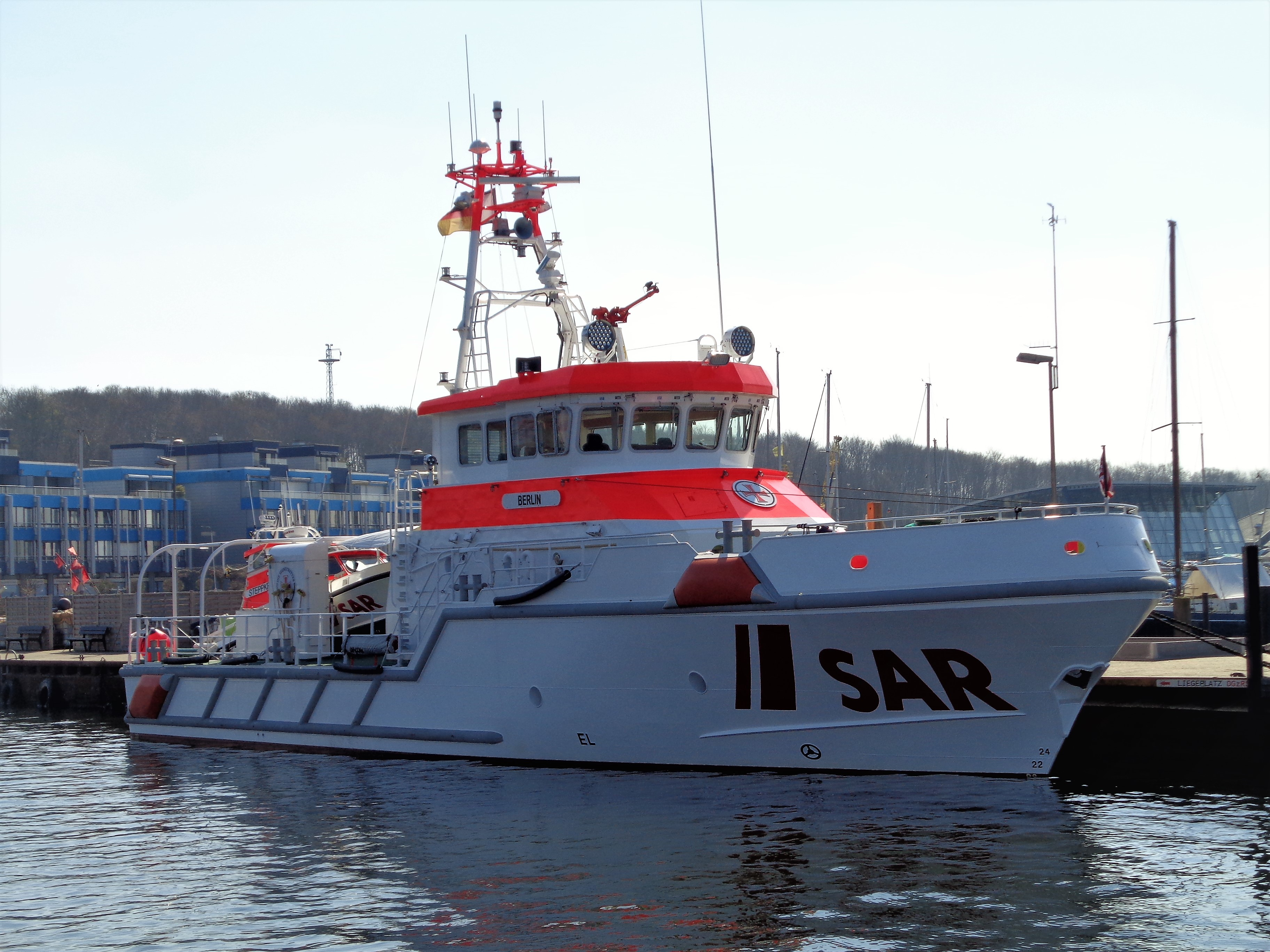 Der im Dezember 2016 in Dienst gestellte DGzRS-Rettungskreuzer "Berllin" im Laboer Hafen. Das Schiff ersetzt den gleichnamigen Vorgänger von 1985.